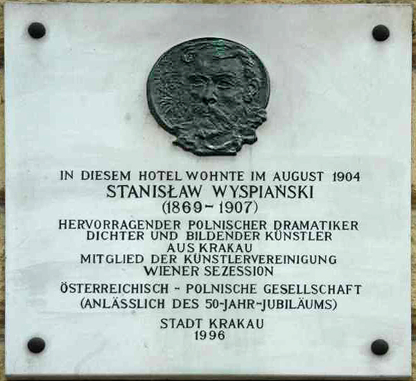 Gedenktafel für Stanislaw Wyspianski (Praterstraße 72)